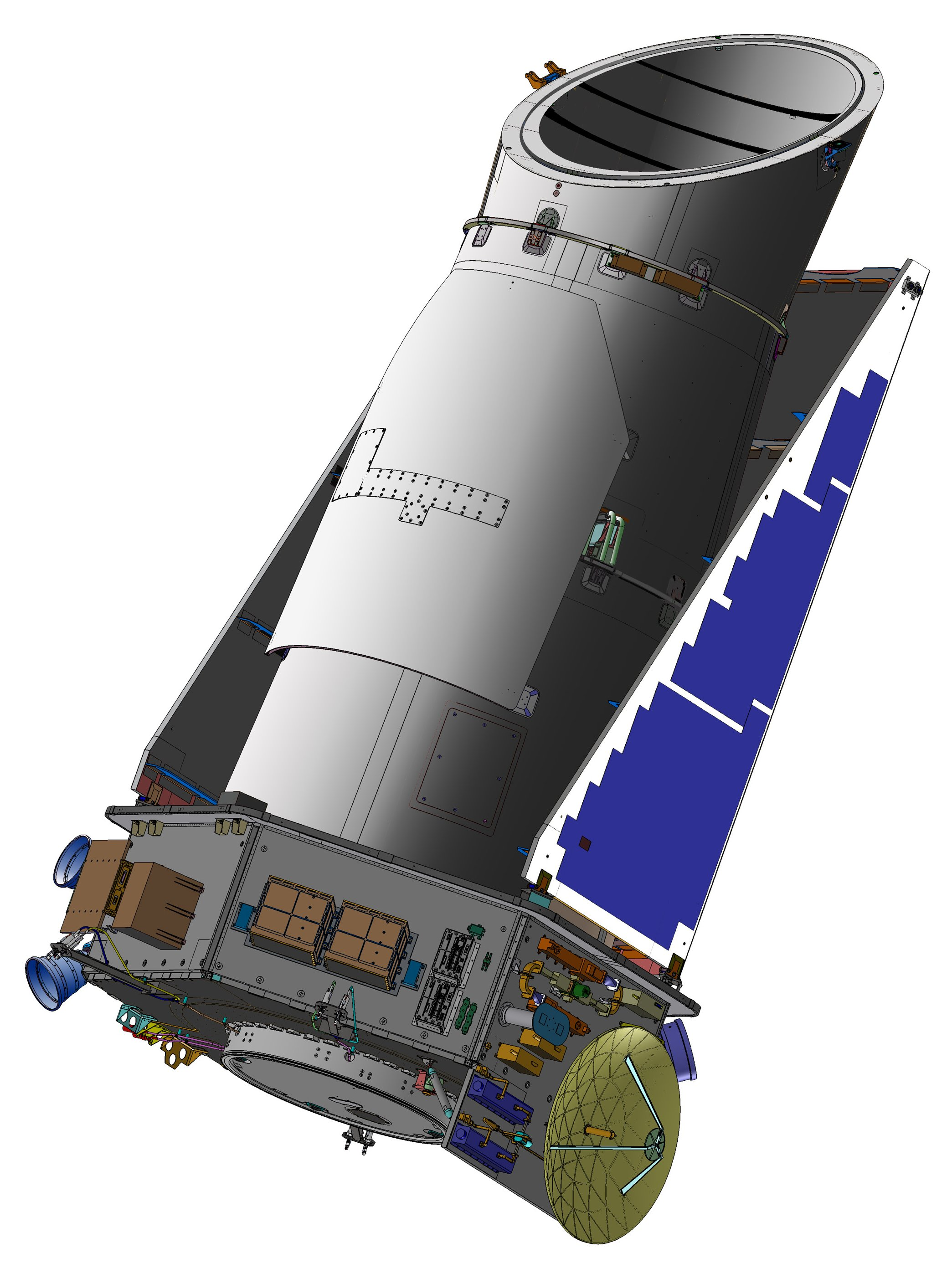 Kepler Space Telescope